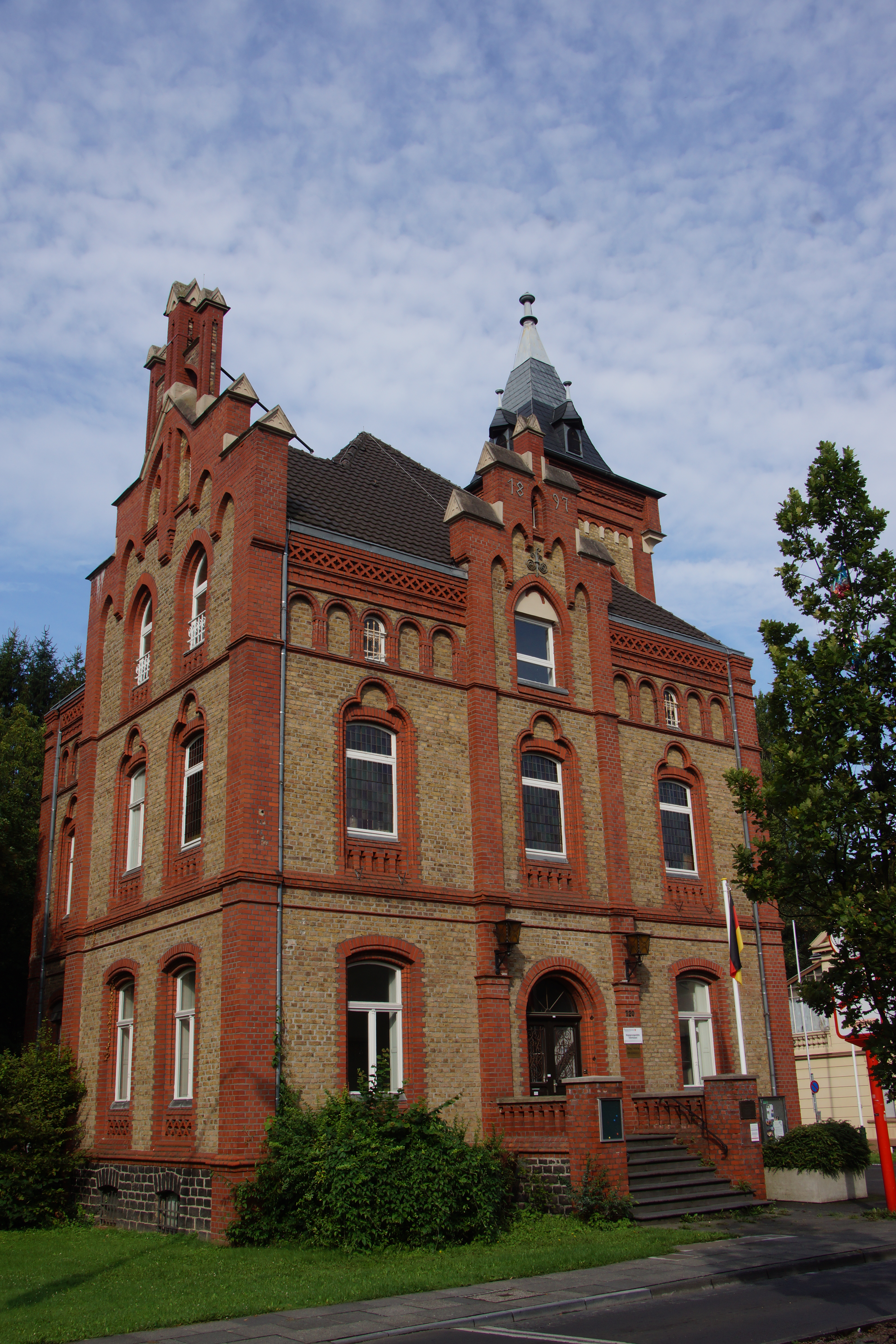 Ehemaliges Rathaus, Königswinterer Straße 720, Oberkassel This is a photograph of an architectural monument. 1117